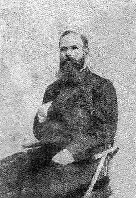 Гавриил Иванович Мазаев - пресвитер, миссионер. Длительное время был кассиром Союза русских баптистов. Основатель и первый председатель Сибирского отдела Союза русских баптистов. Младший брат Д. И. Мазаева.